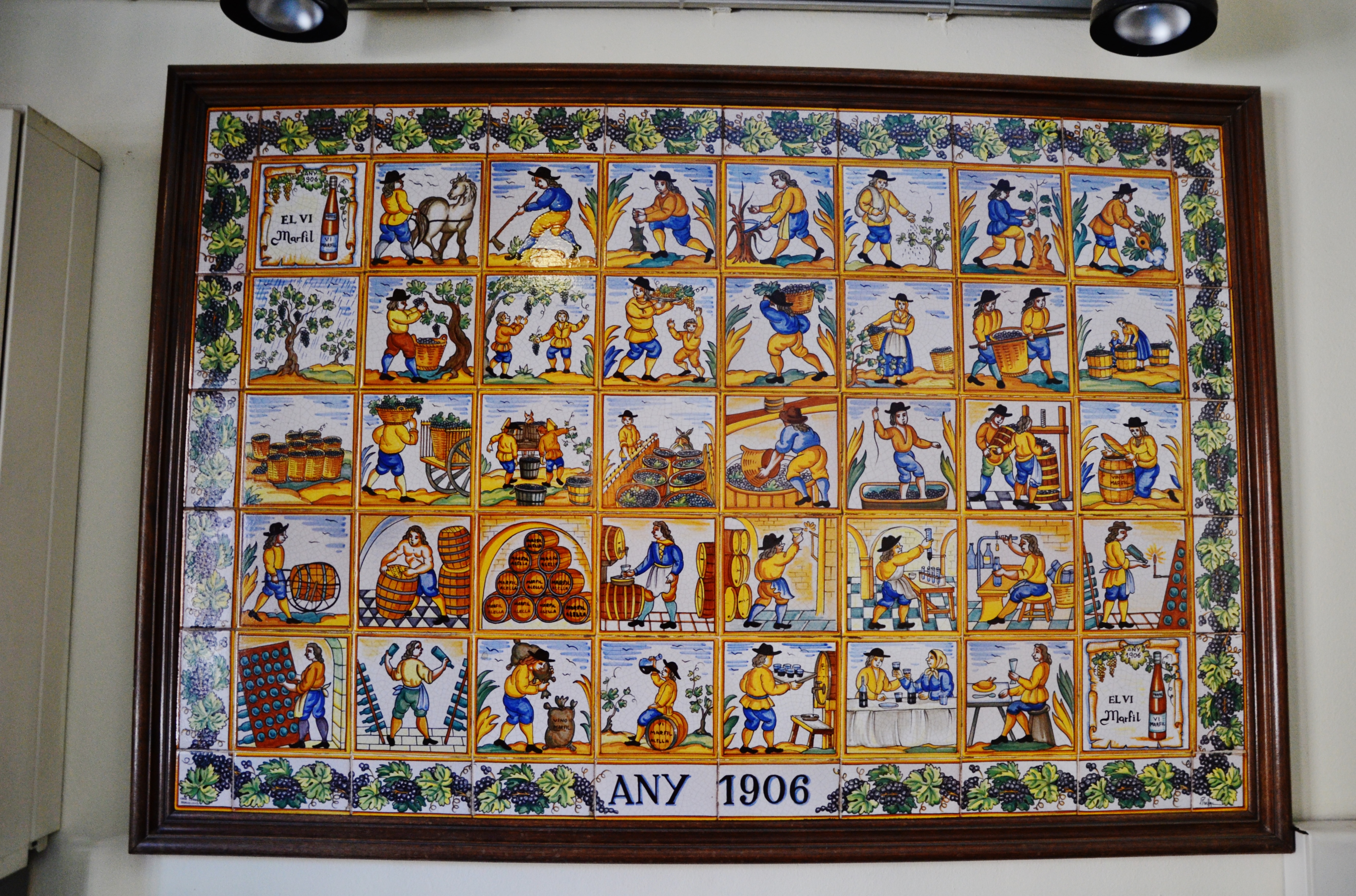 Celler Cooperatiu Alella Vinícola (Alella)